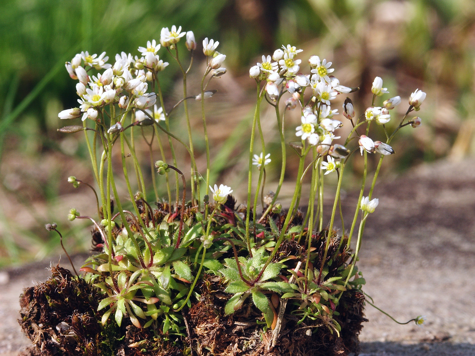 Erophila verna subsp. verna, Schwäbische Waldberge, Germany